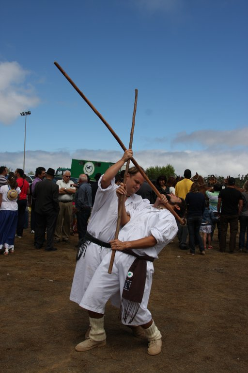 Palo canario